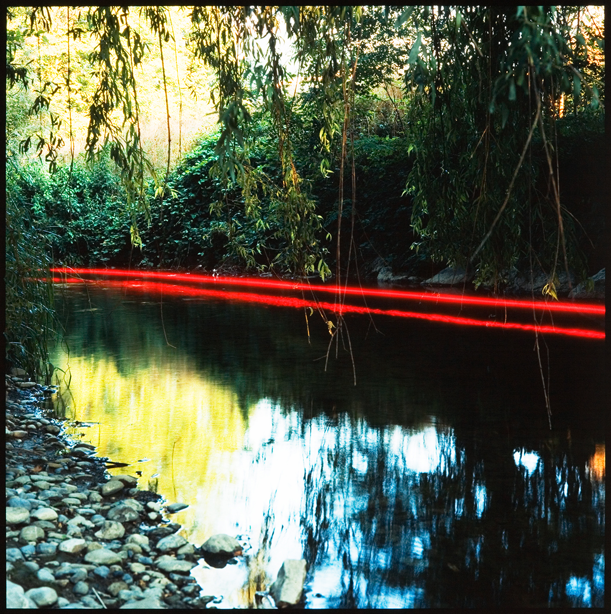 Graffiti rouge #11, 1984, tirage papier Michel Fresson vintage 30 x 30 cm Red Graffiti #11, 1979, Michel Fresson print, 12 x 12’’, 30 x 30 cm, vintage print